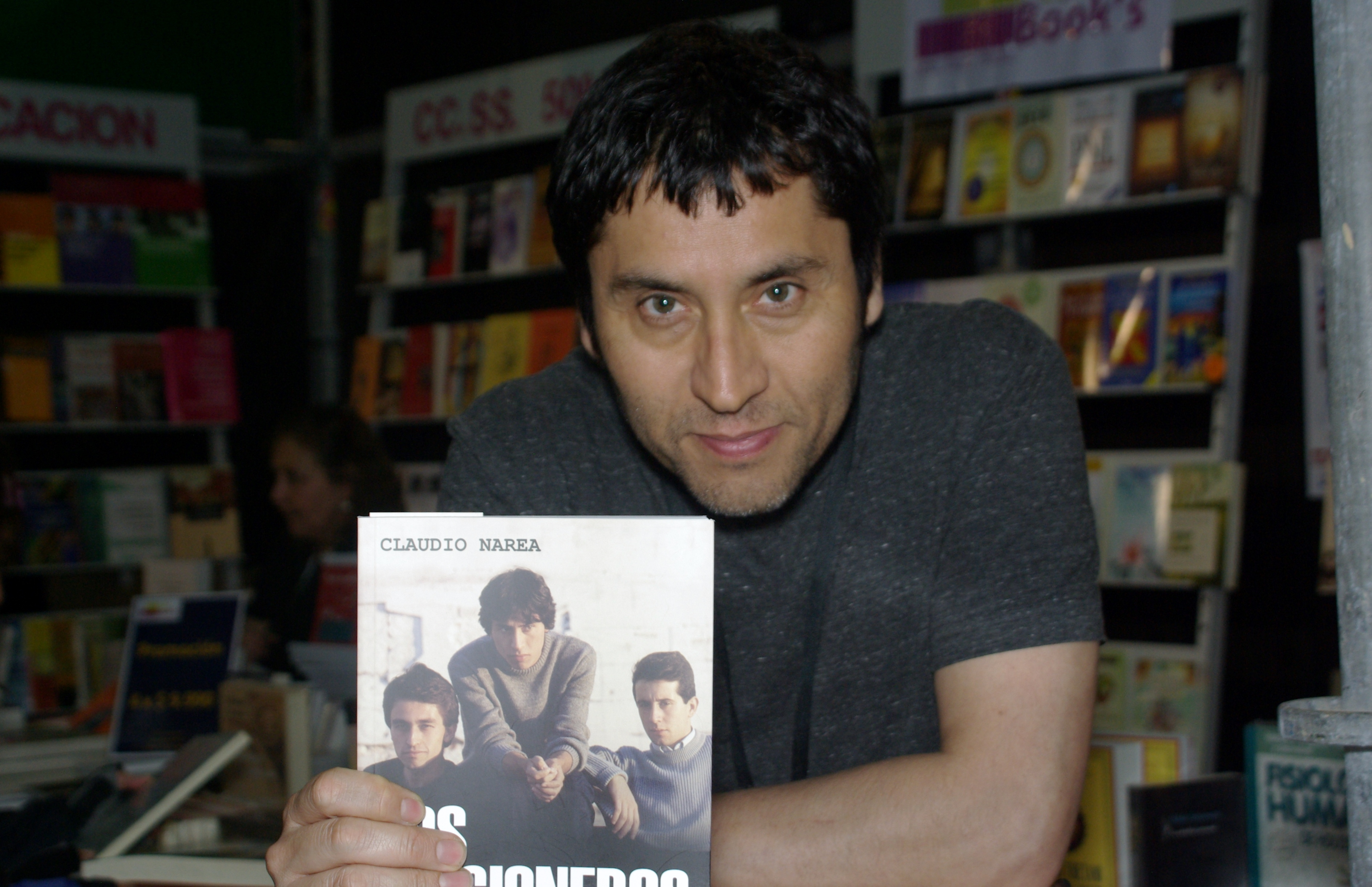 El guitarrista, cantante y compositor chileno de rock Claudio Narea en la Feria Internacional del Libro de Santiago 2015